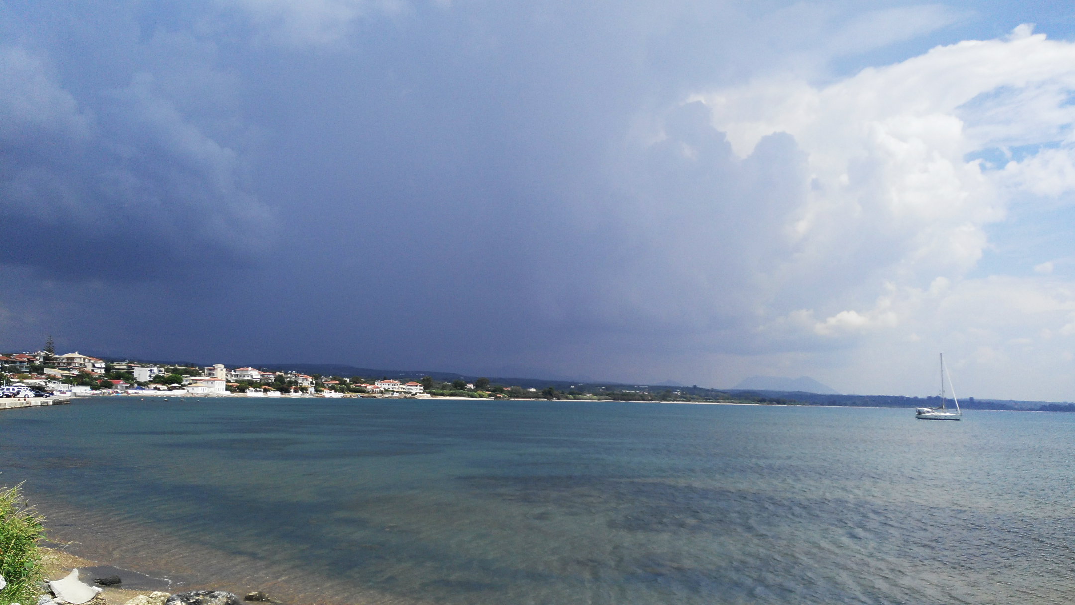 Όψη της παραλίας του Ψεύτη στο Πεταλίδι Μεσσηνίας